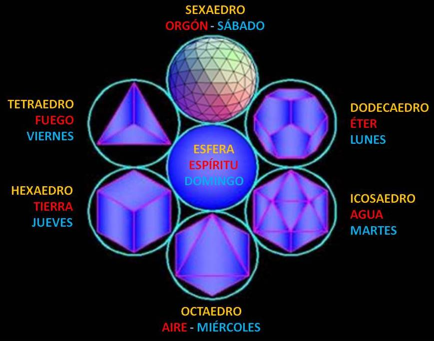 Diagrama que muestra el enfoque del matemático Ibo Bonilla para la relación entre los 5 sólidos platónicos tradicionales, la esfera y sexaedro que propone con la flor de la vida